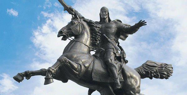 Памятник Шарвили в Махачкале (Дагестане)